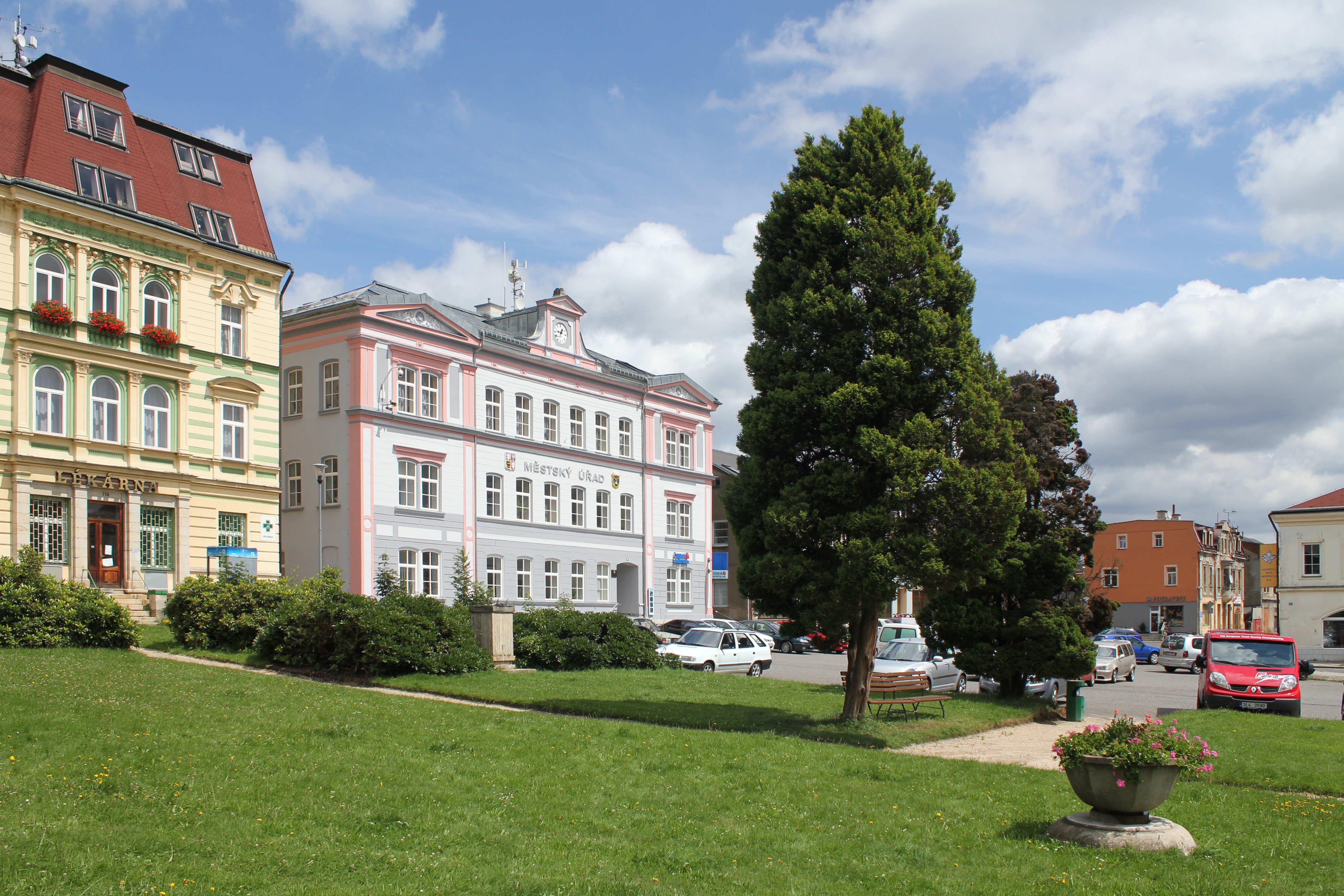 Náměstí T. G. Masaryka